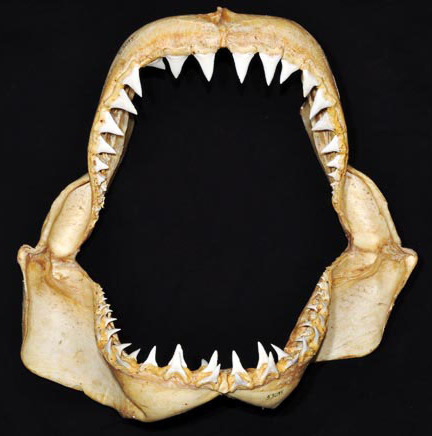 Carcharodon carcharias